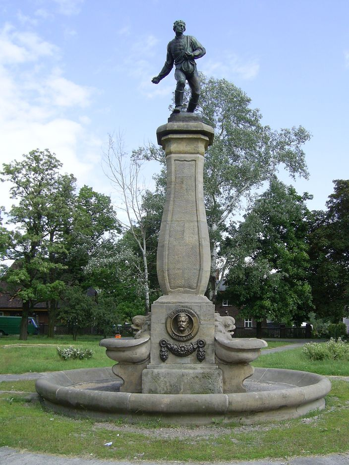 Zdjęcie przedstawia pomnik "Siewcy" w Luboniu.